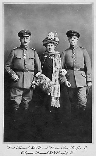 Fürst Heinrich XXVII. Reuß jüngere Linie mit Frau Elise, geb. Prinzessin zu Hohenlohe-Langenburg und Sohn Heinrich XLV.